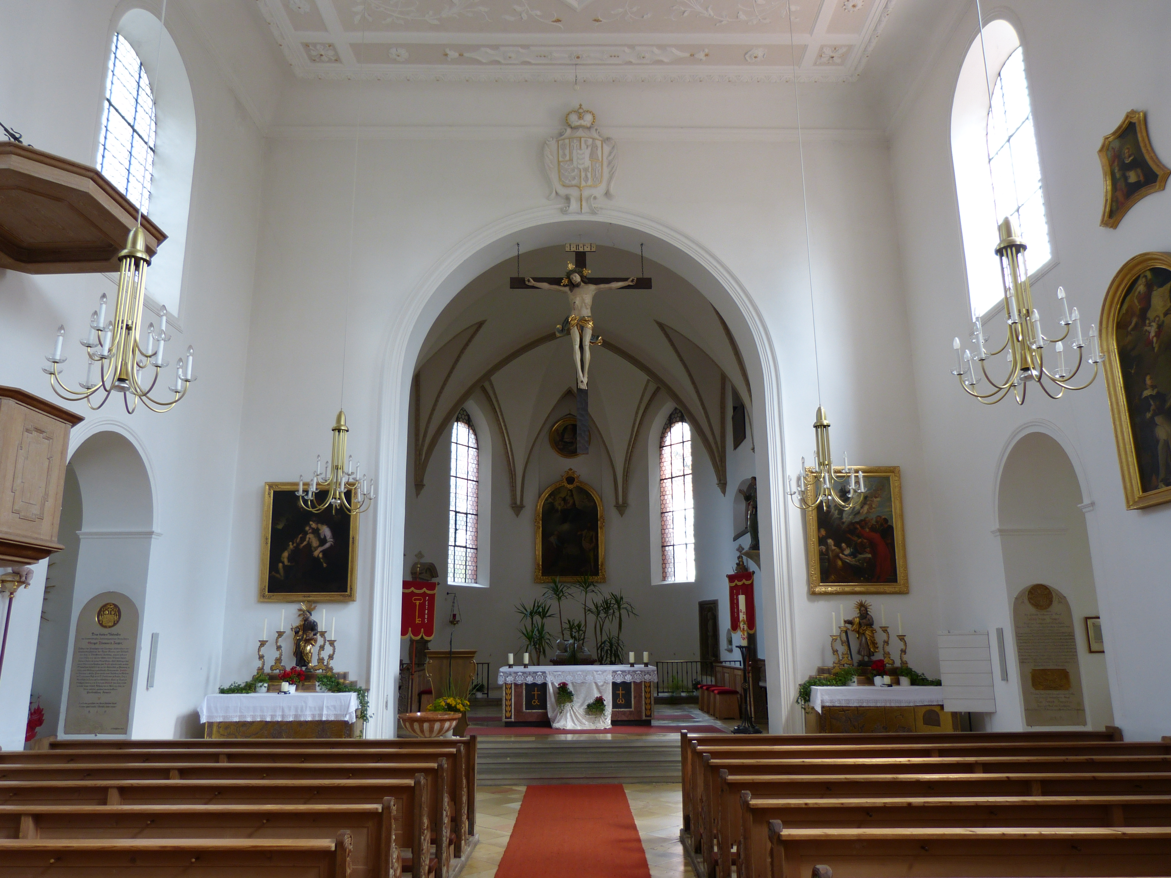 St. Peter und Paul, Kirchheim in Schwaben, Landkreis Unterallgäu, Bayern